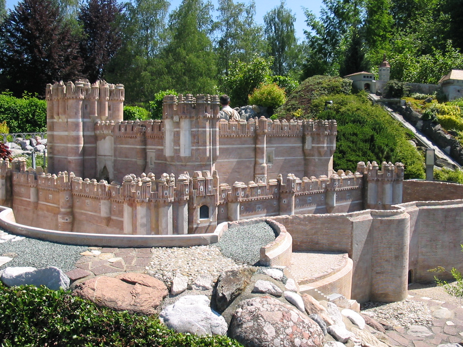 Burg Coca at Minimundus Klagenfurt